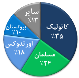 نسخه فارسی